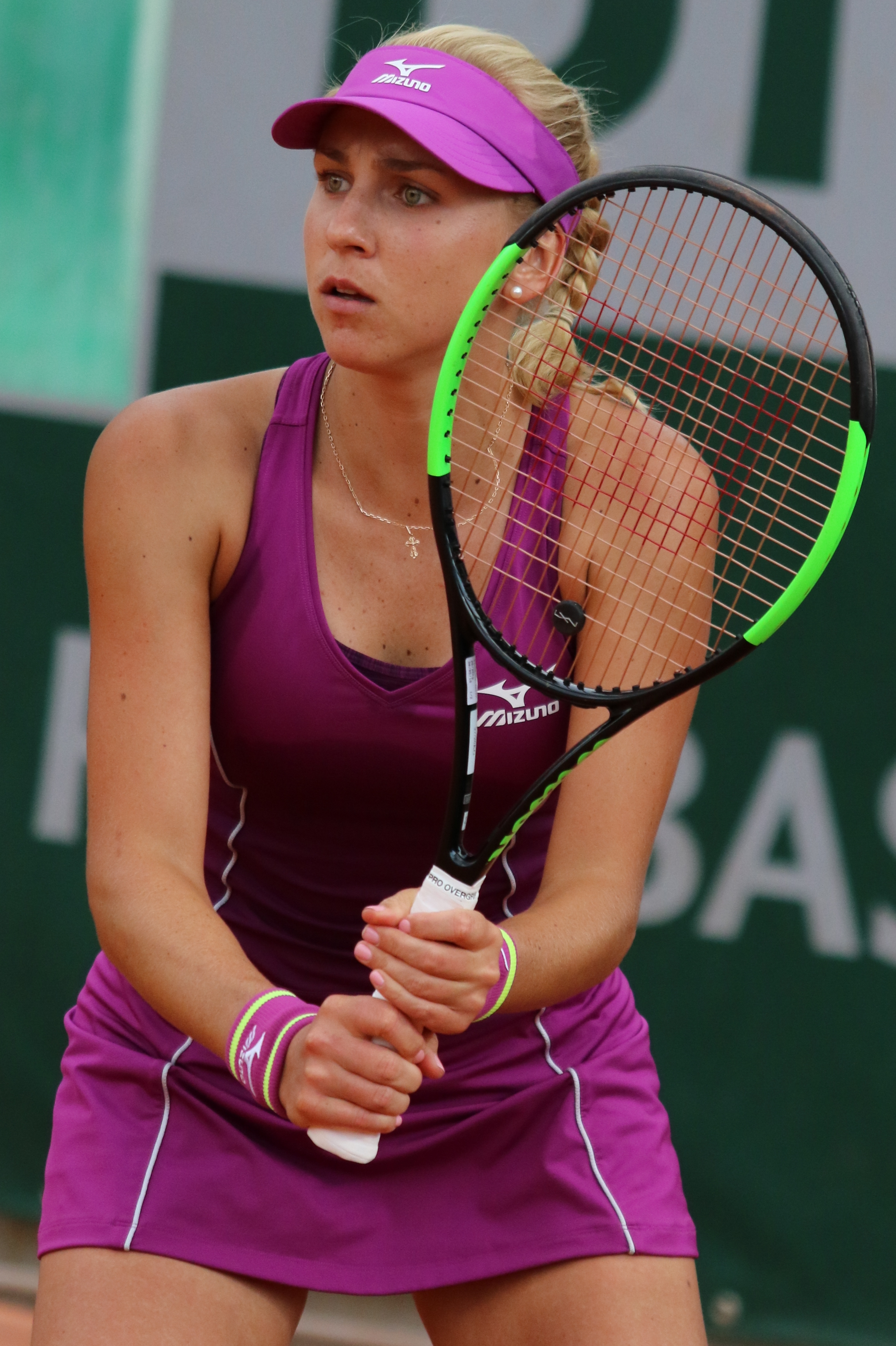 Kichenok N. RG18 (14)